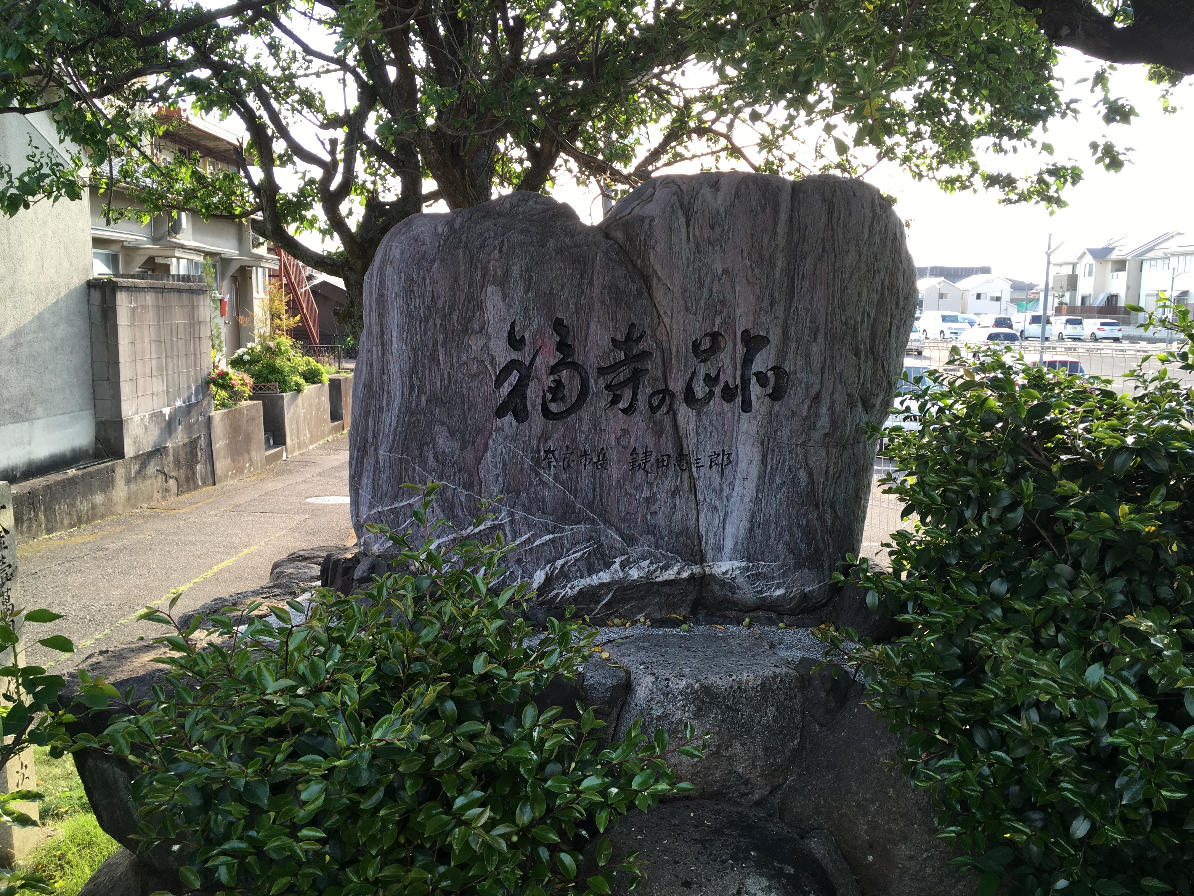 奈良市、福寺跡の碑